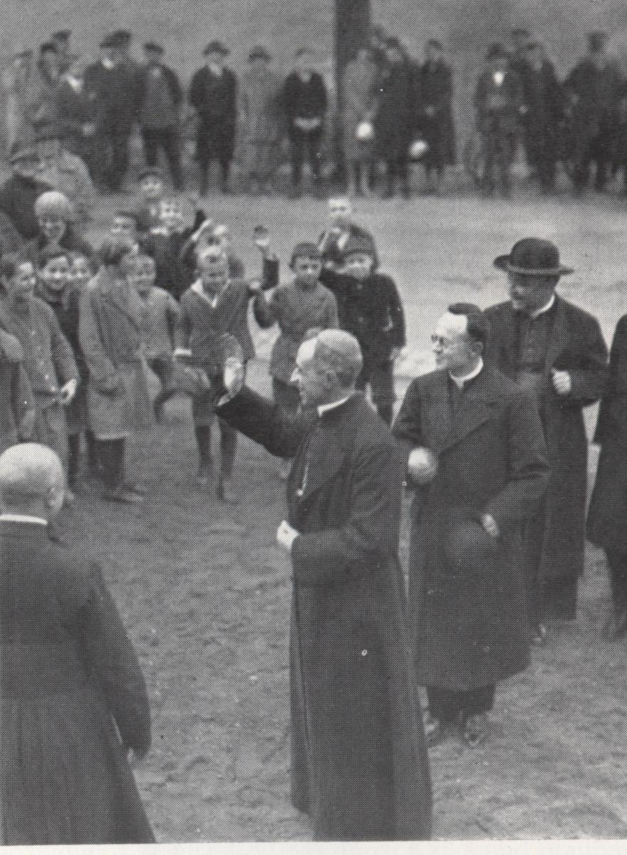 Prälat Martin Walzer rechts neben Papst Pius XII., Ludwigshafen 1928